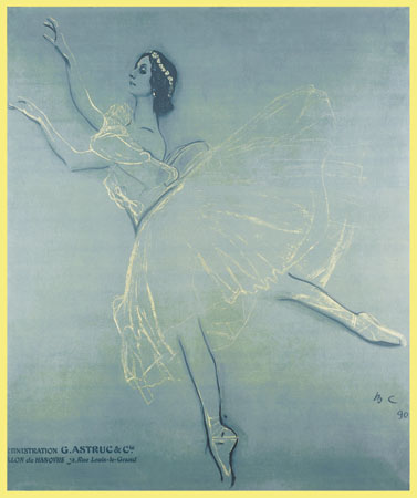 Theatre du Chatelet. Saison russe. Mai-Juin 1909. Opera et Ballet. Paris, 1909 Хромолитография; 250 х 190